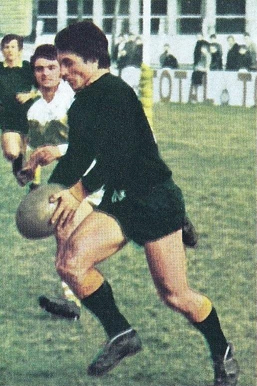 Jean-Michel Benacloï (1971), 'Ageducatifs Rugby 1971 - 1972 Panini', n°161.